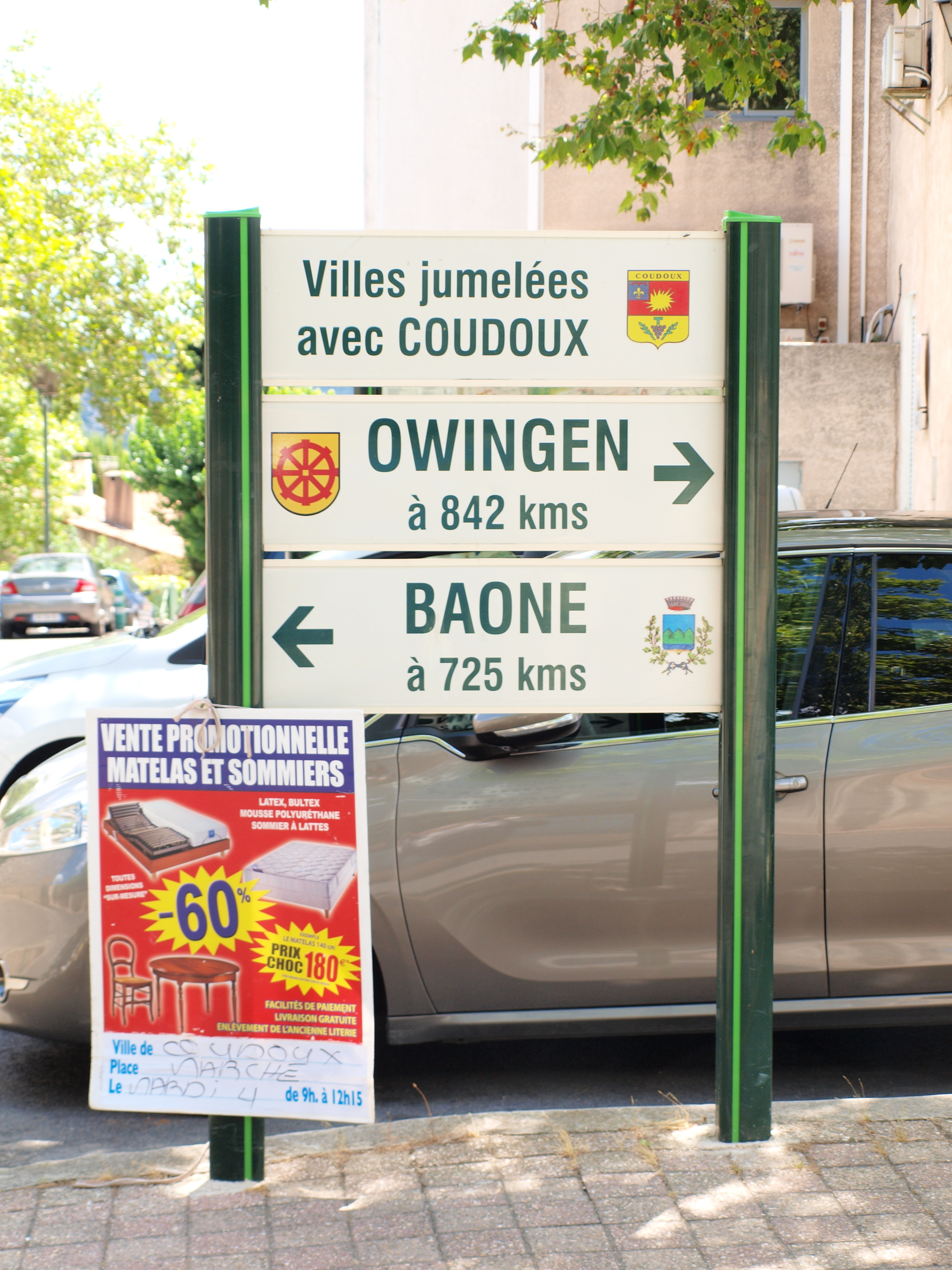 Coudoux (Bouches-du-Rhône, France)